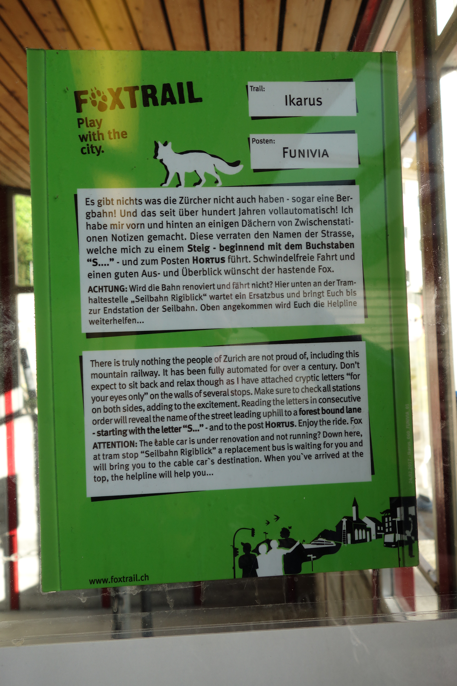 Foxtrail Ikarus Funivia, Zürich, Schweiz